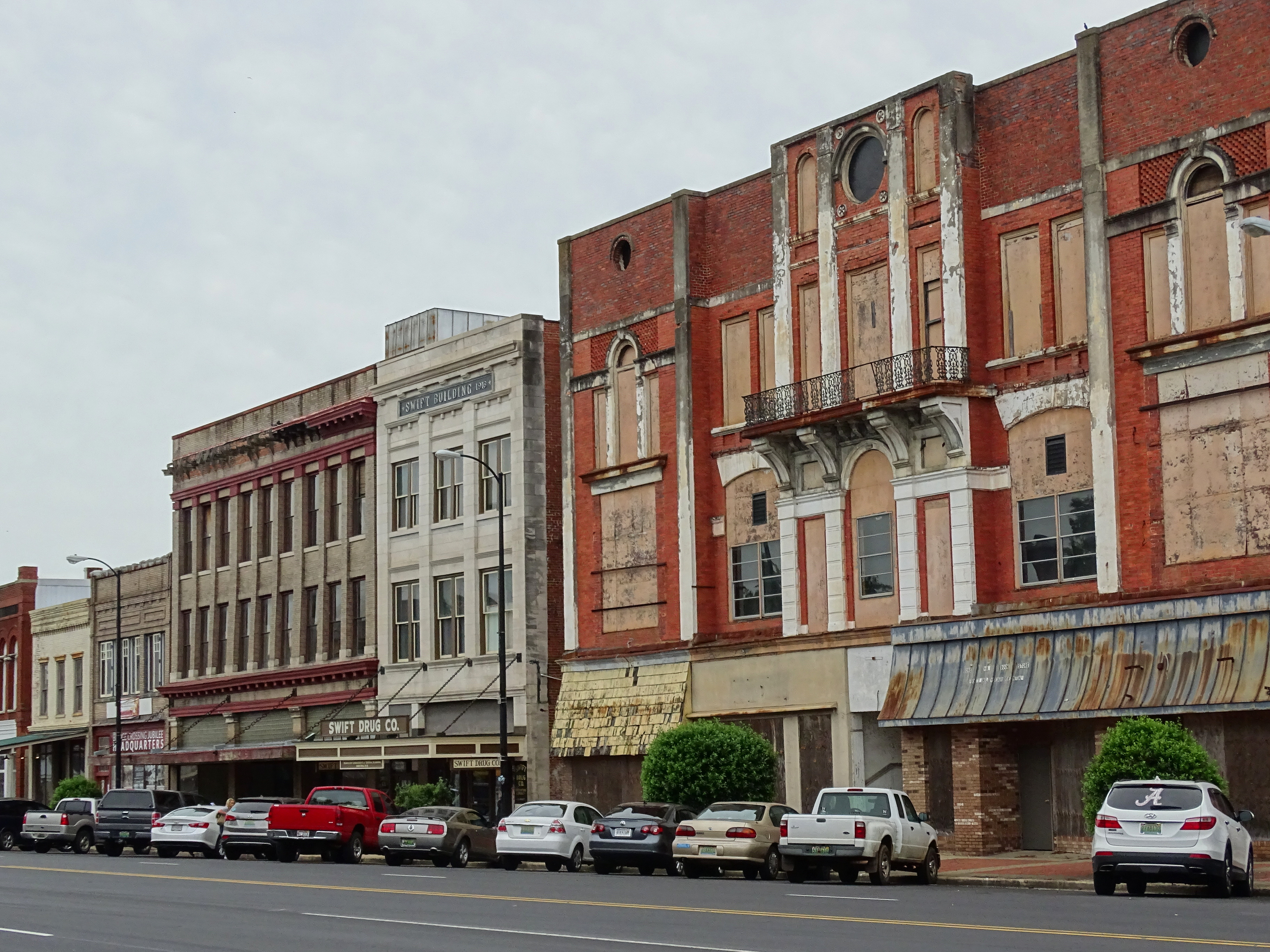 Main Street Facades - Selma - Alabama - USA